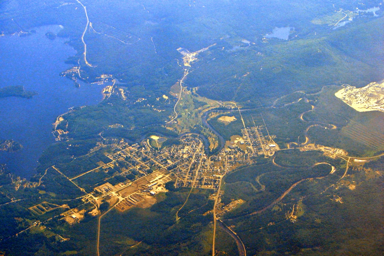 Saint-Michel-des-Saints, Quebec, Canada